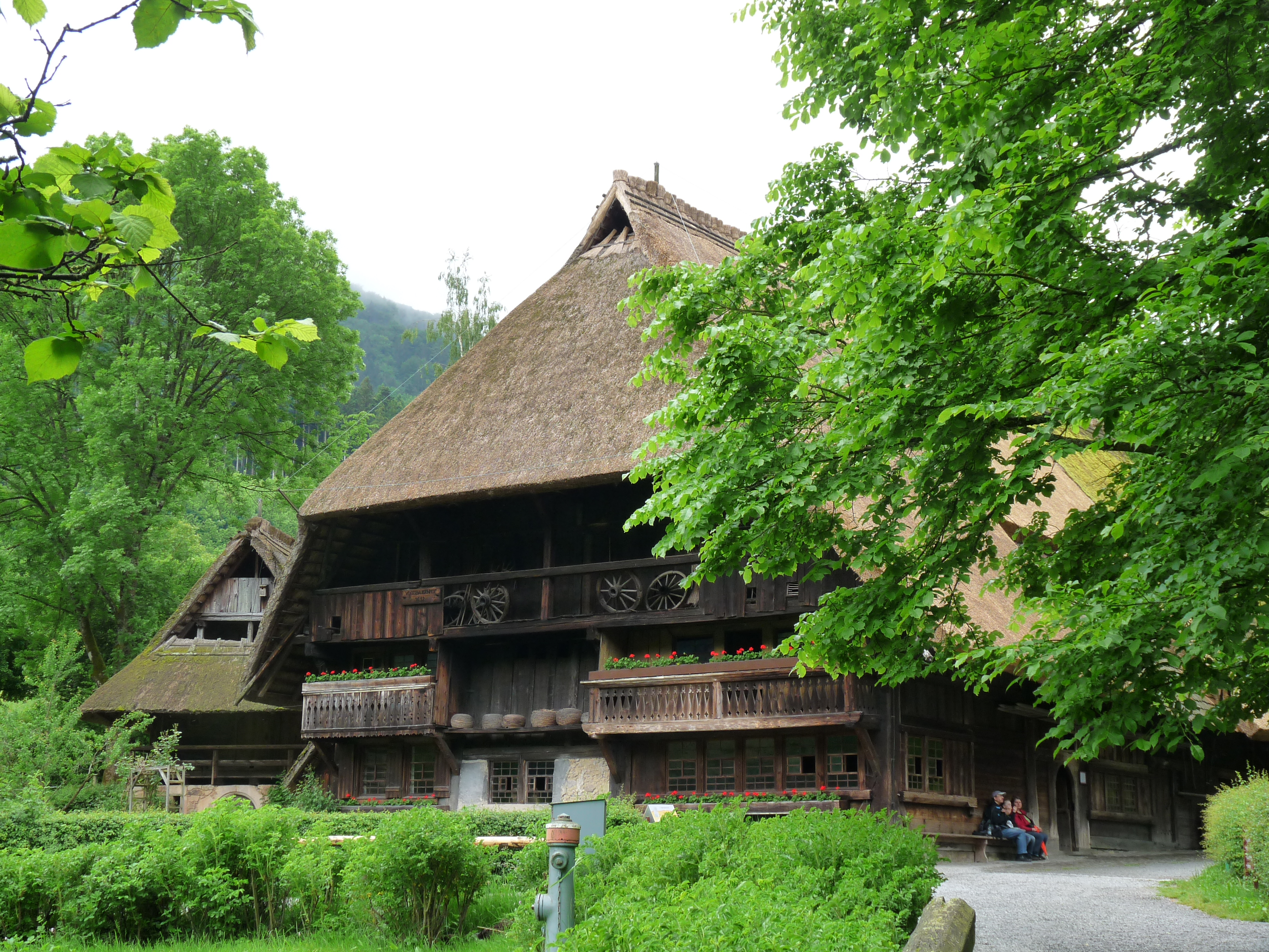 Ancienne ferme au musée en plein air Vogtsbauernhof (Gutach)